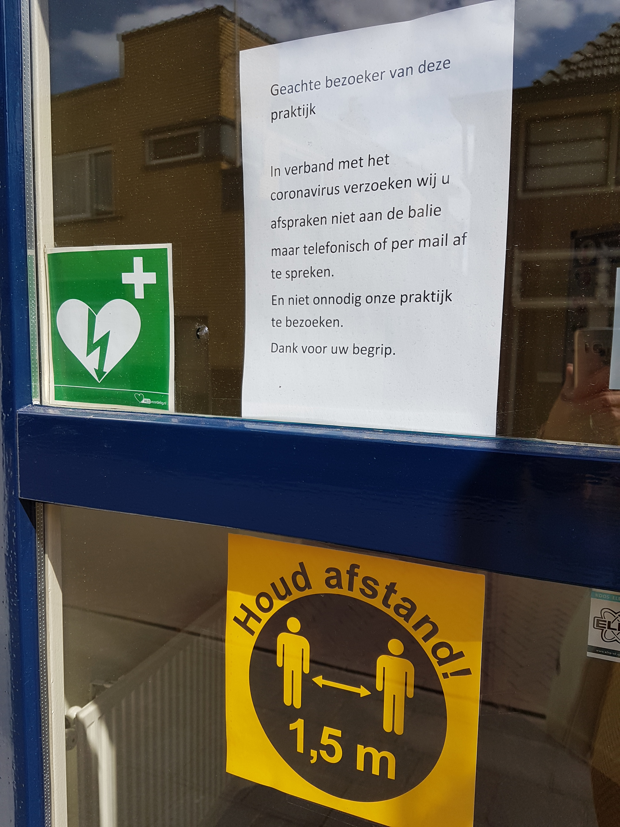 stickers en brief op de ingang van de tandartspraktijk